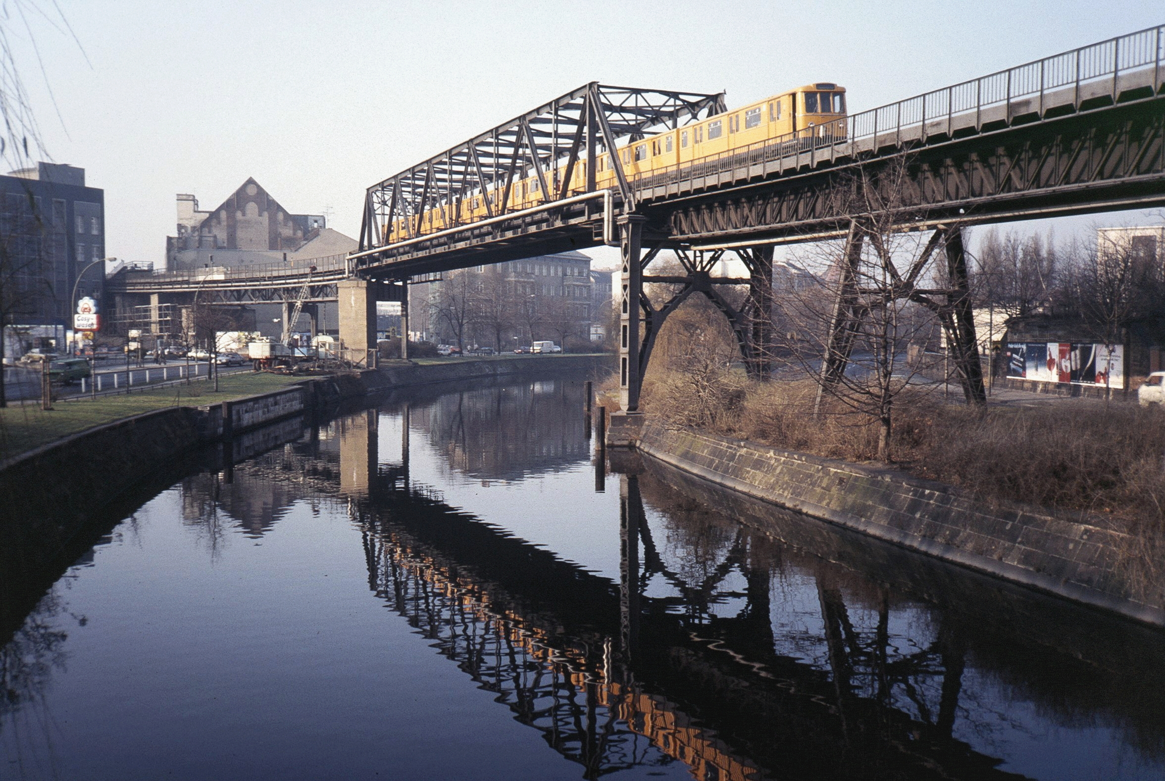 Ehemalige Brücke der U1 über den Landwehrkanal